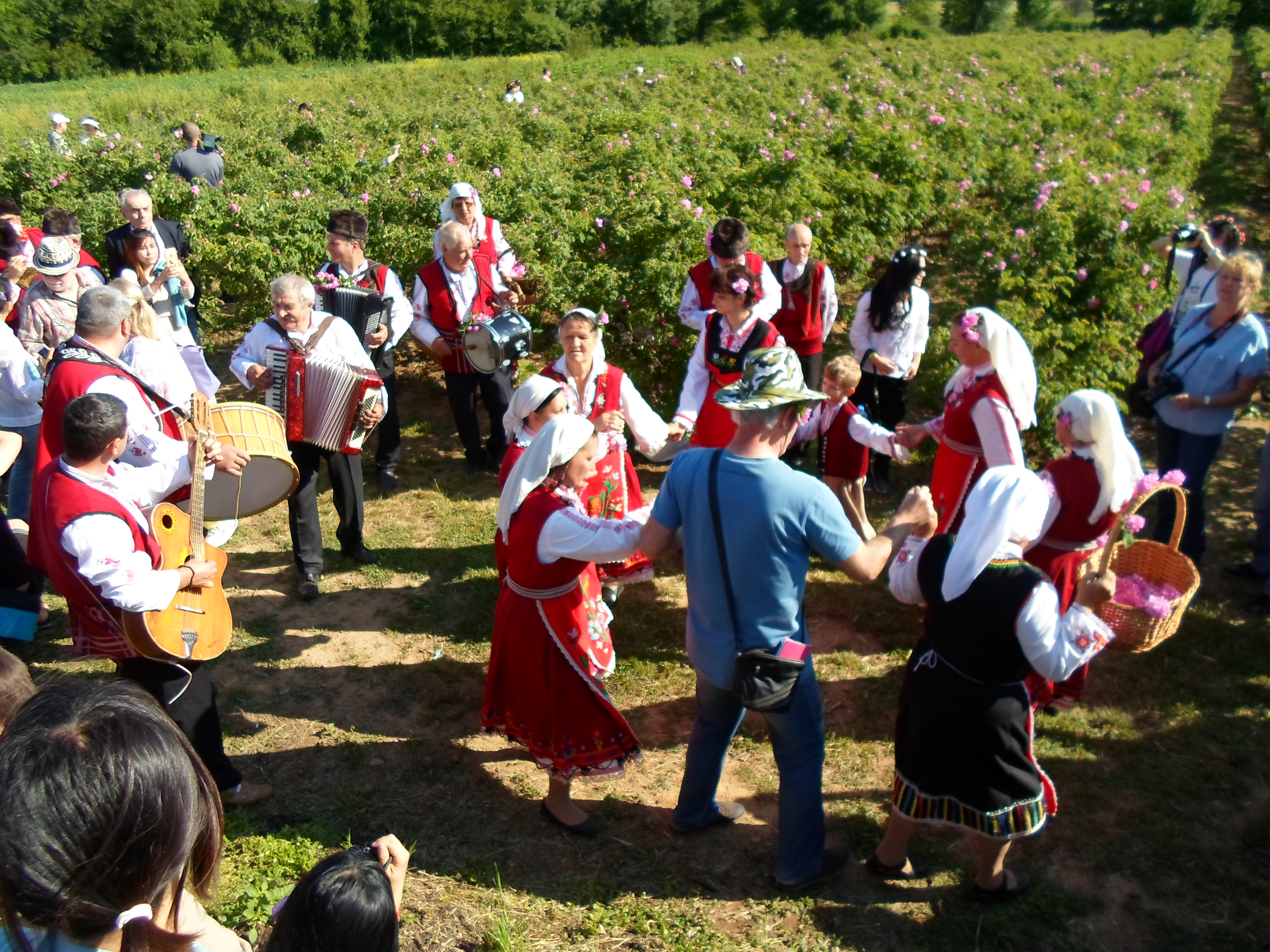 Ритуалът „Розобер“ в село Розово (област Стара Загора), 2014 г.